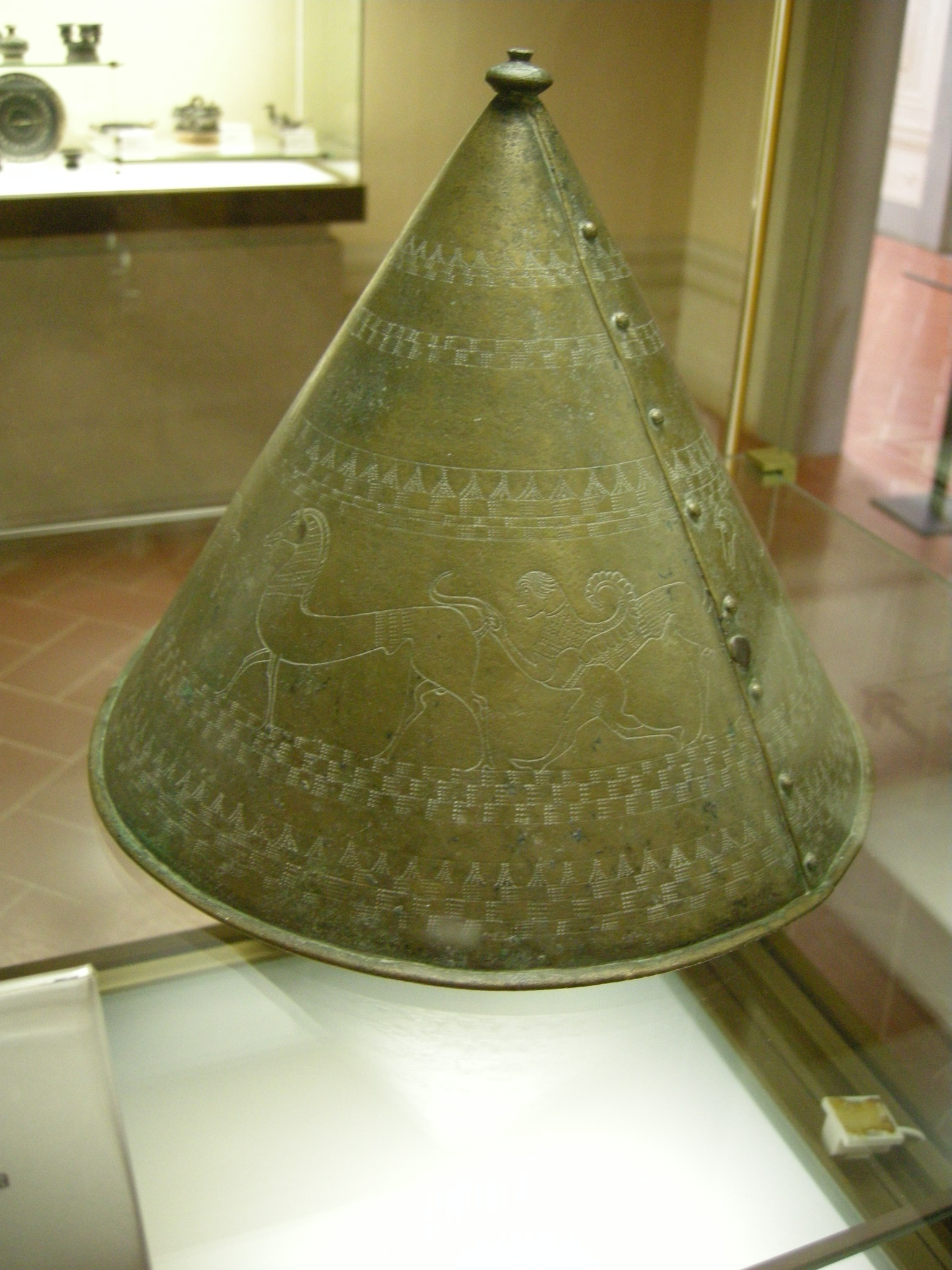 Museo archeologico di Firenze, elmo pileato paleoveneto da Oppeano (V sec. ac)